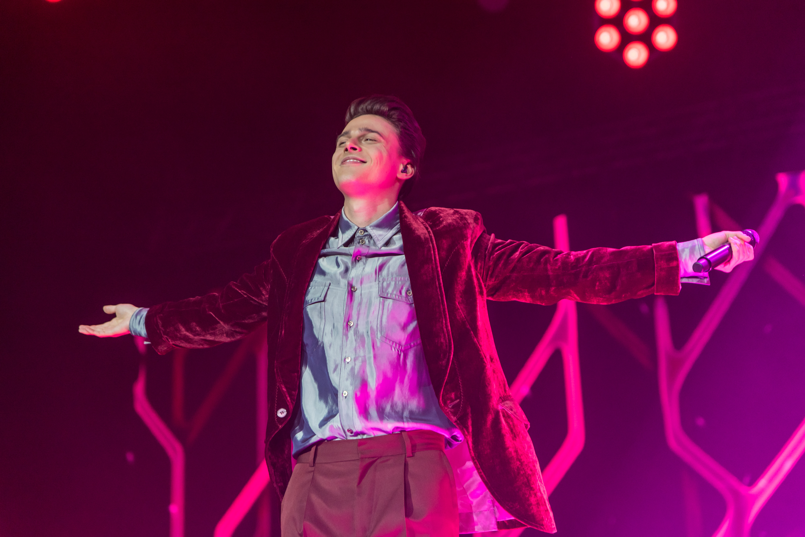 ALEKSEEV на Big Love Show 2018 в СПб